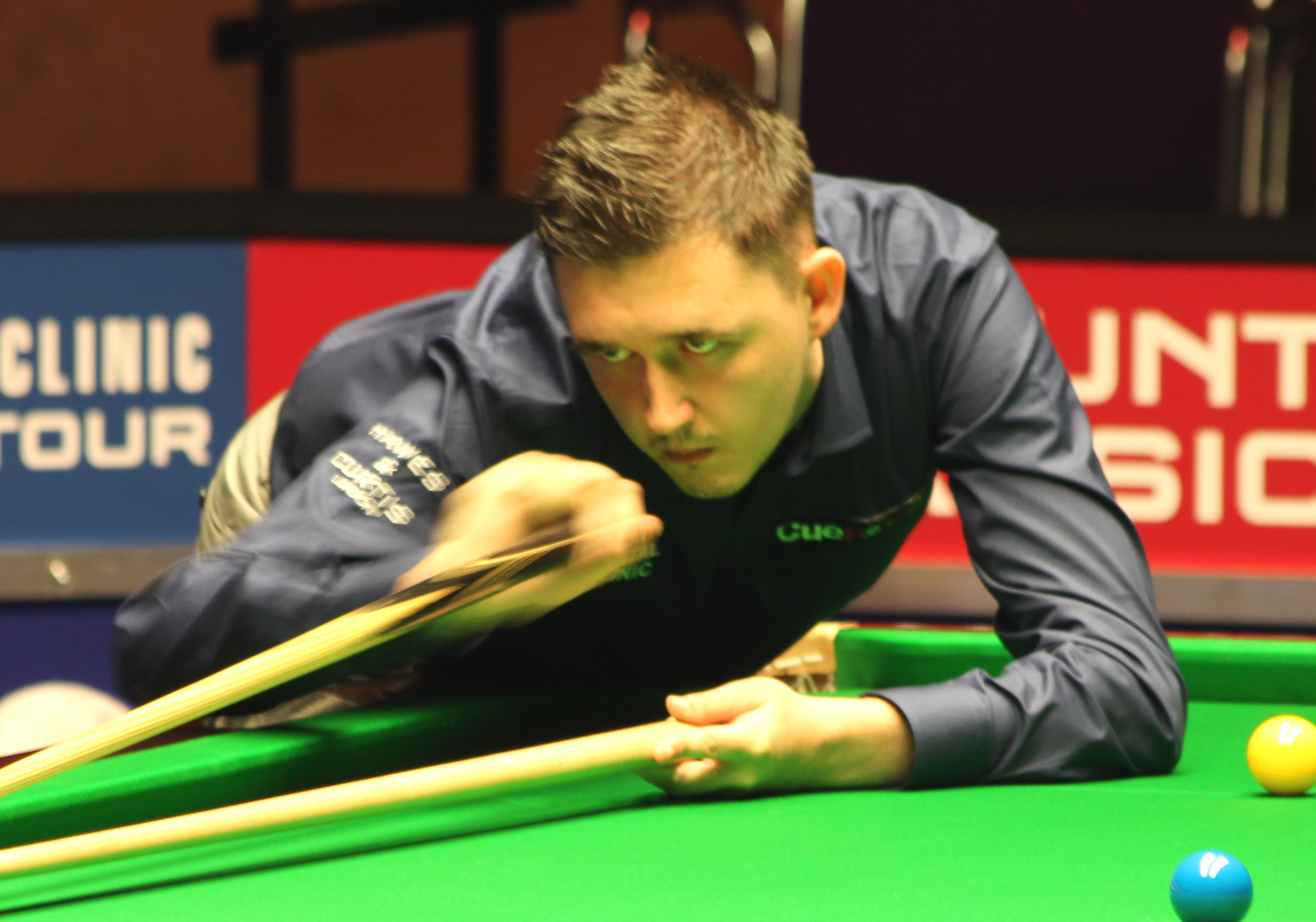 Kyren Wilson beim Paul Hunter Classic 2015